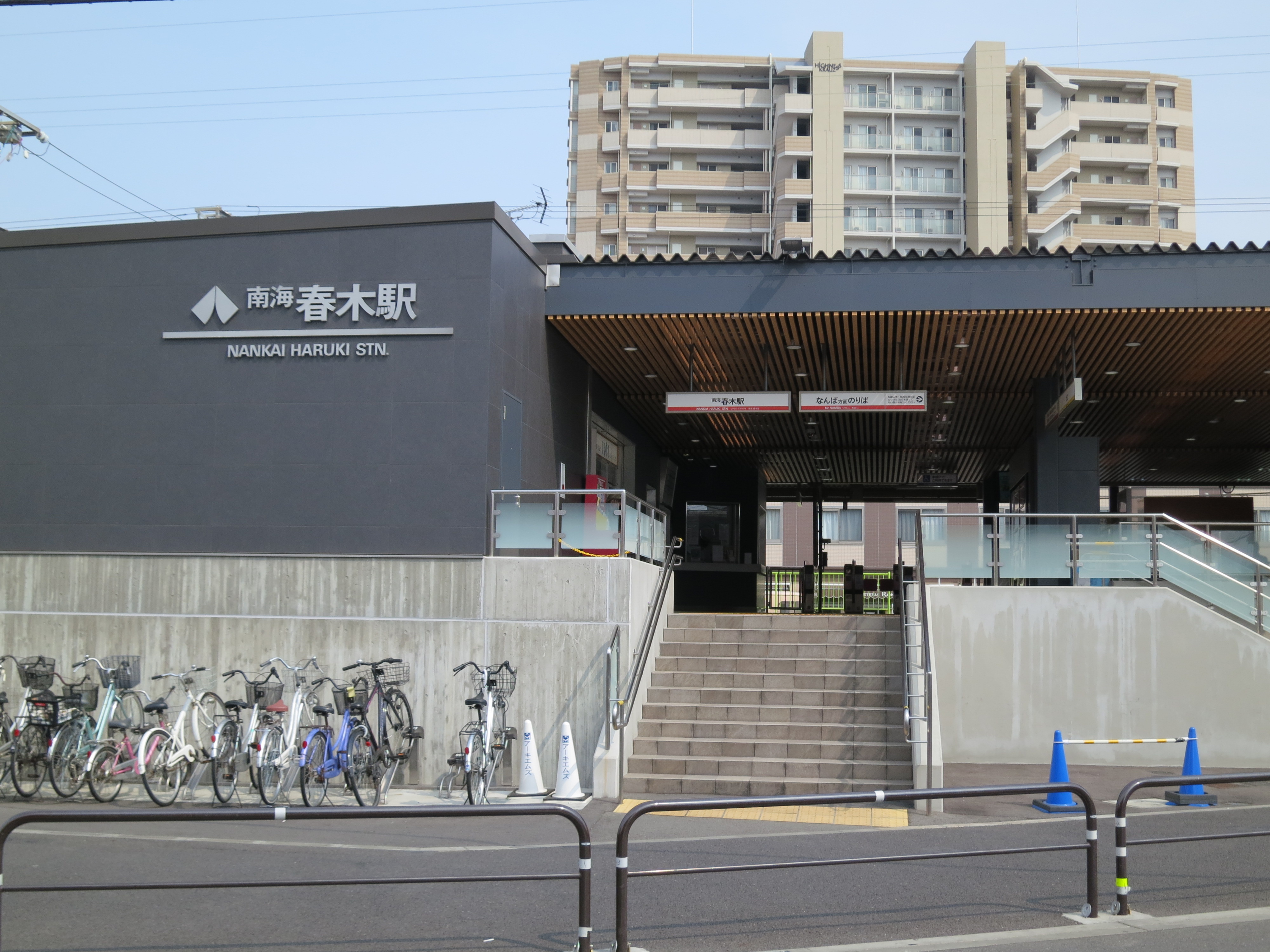 南海春木駅(なんば方面) Canon PowerShot S100